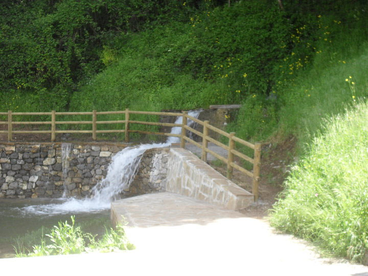 Sorgente mercure